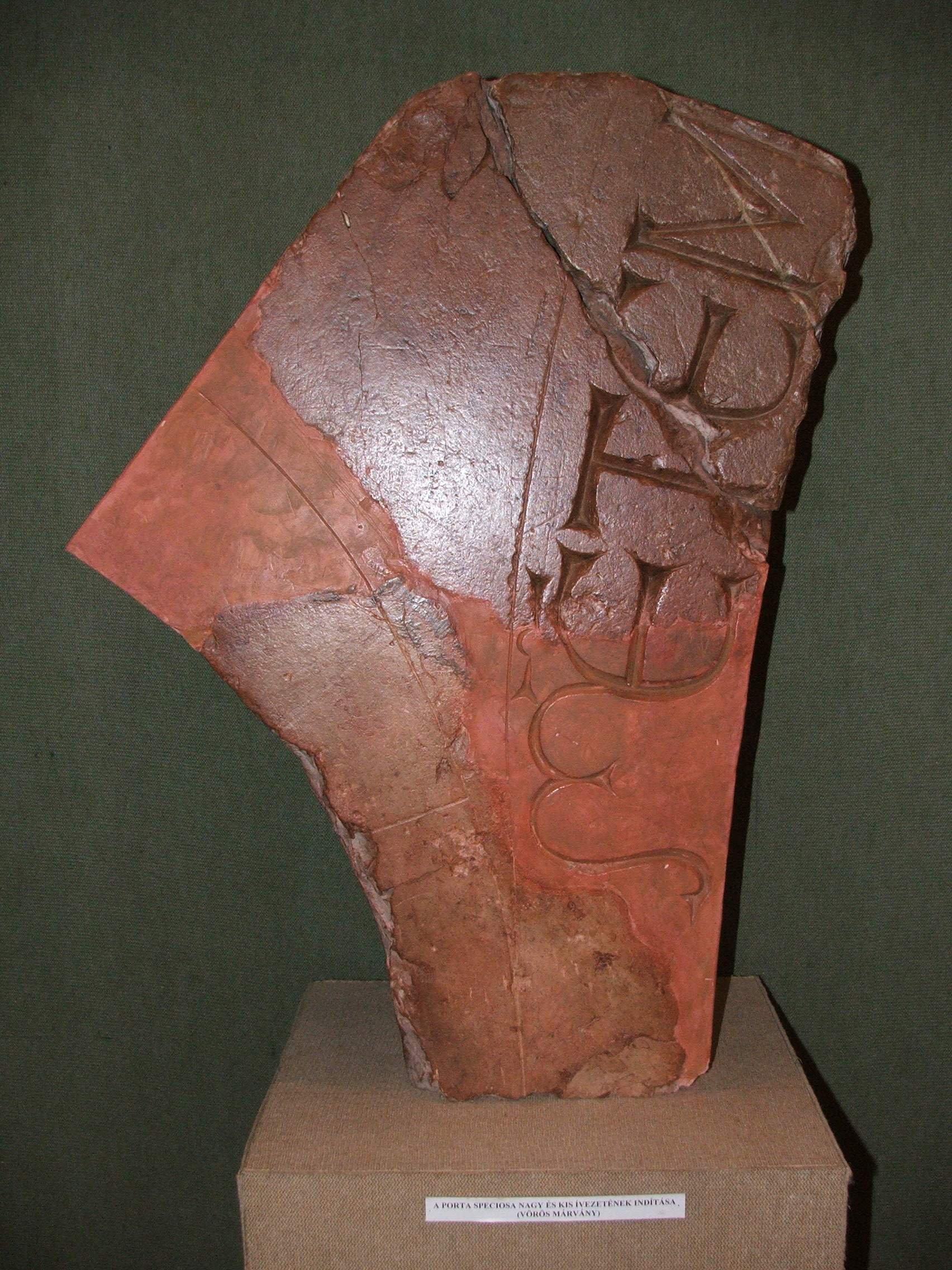 A Porta Speciosa egy részlete az esztergomi Balassa Bálint Múzeumban.